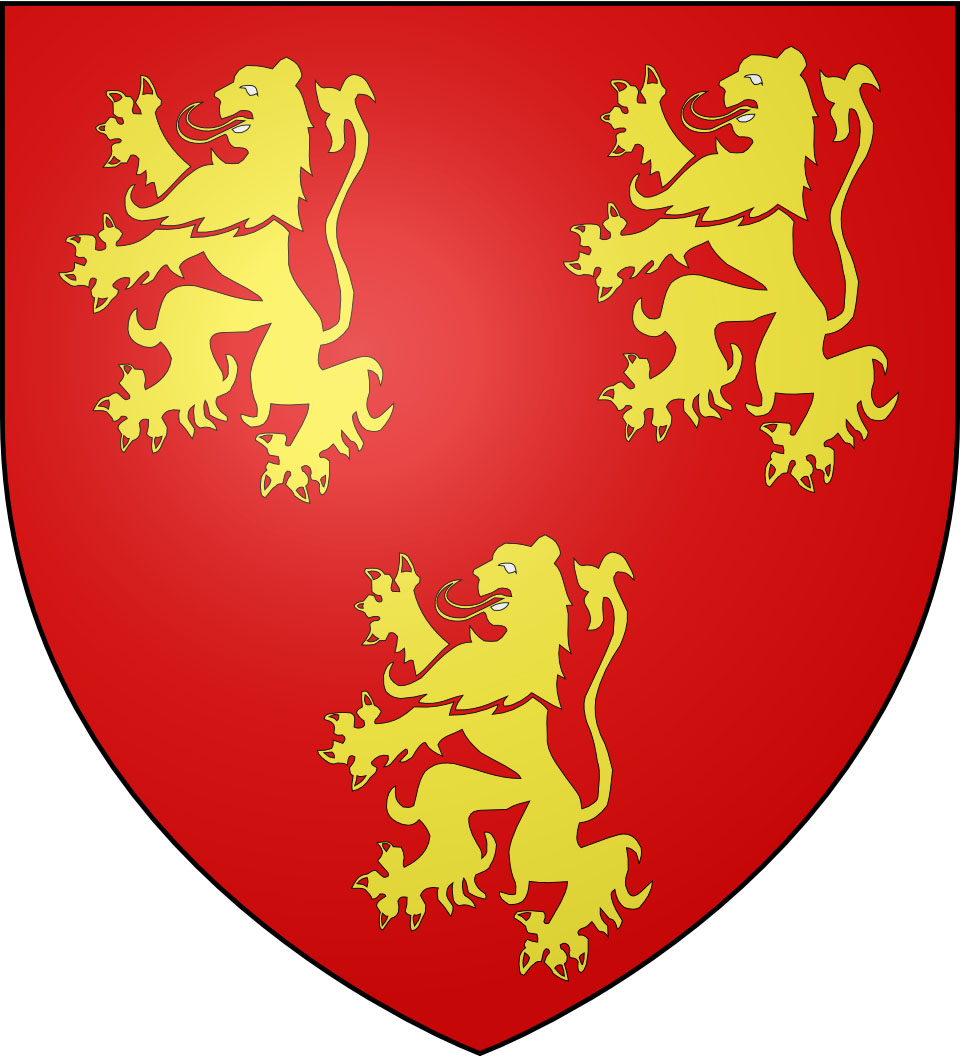 Blason d'Armand de Périgord